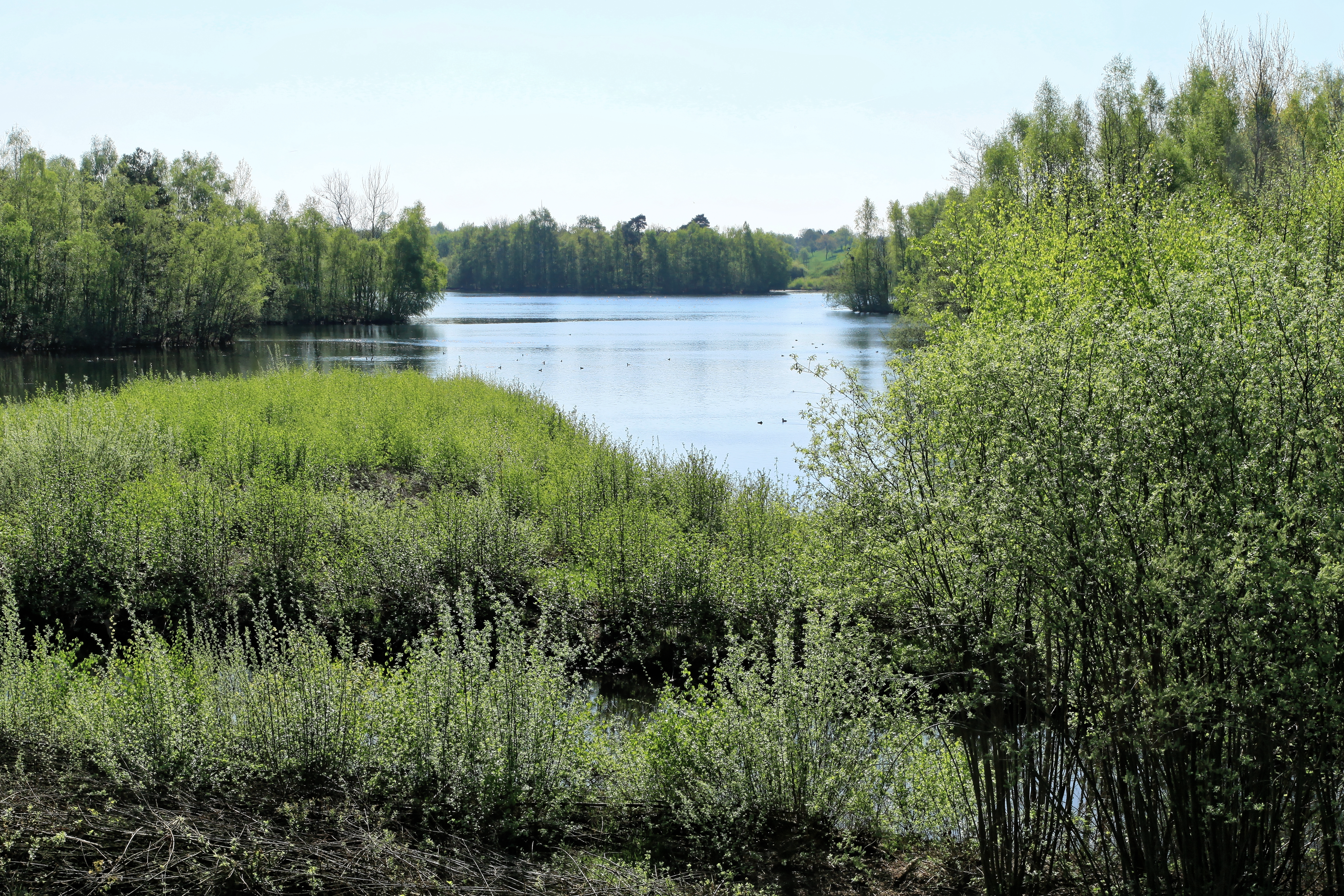 NSG Biotop am Speicherbecken Geeste, Osterbrocker Straße in Geeste